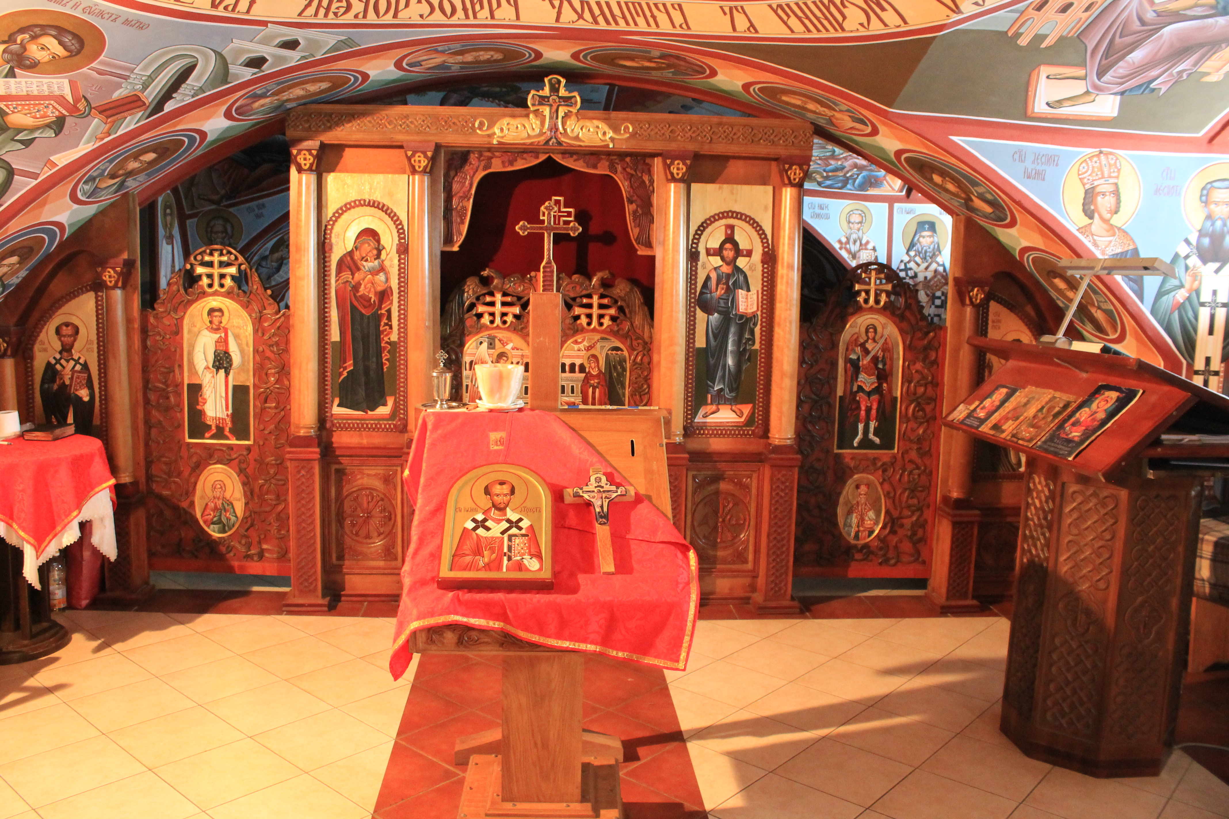 Kapela Sv. Jovana Zlatoustog